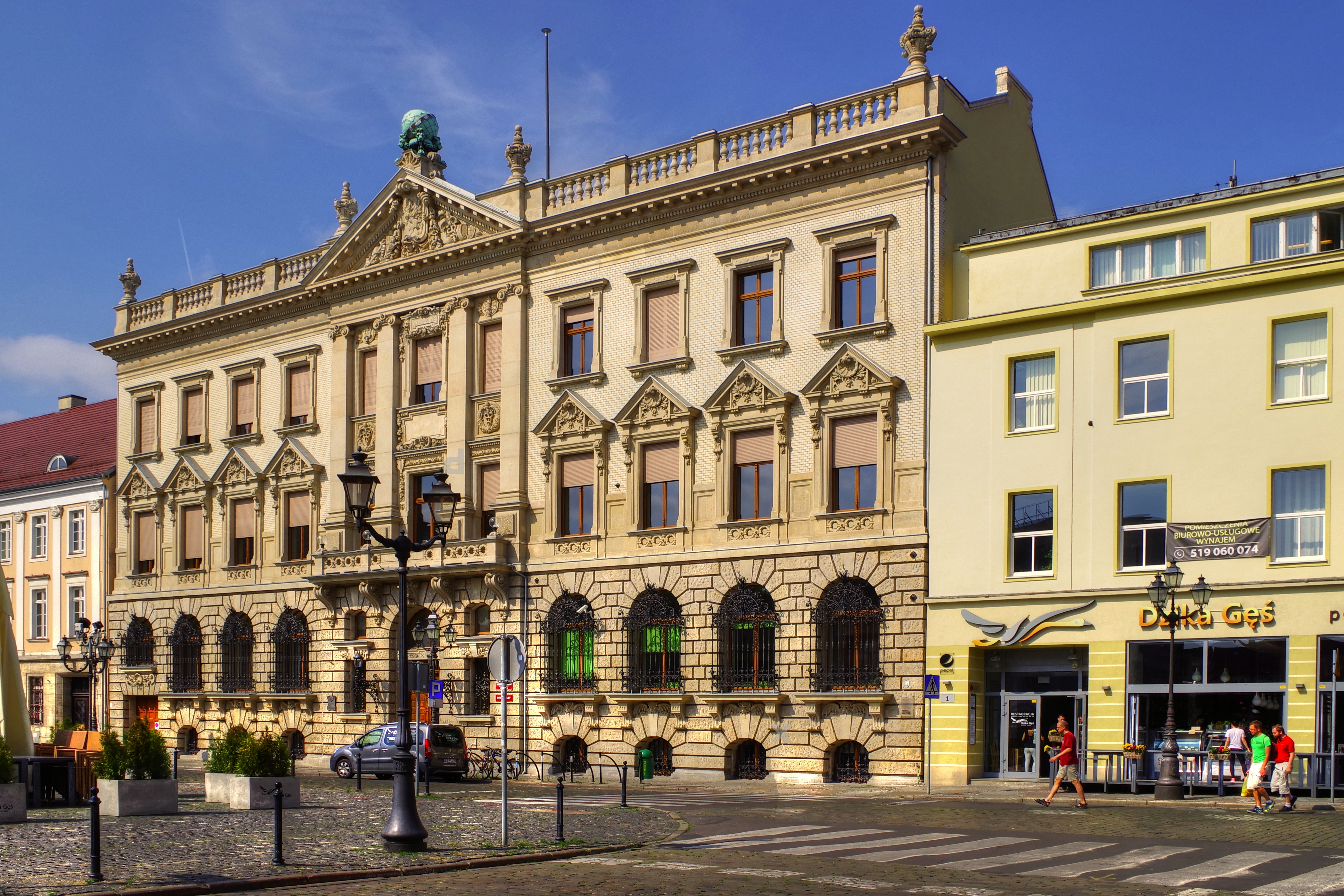 Pałac pod Globusem w Szczecinie